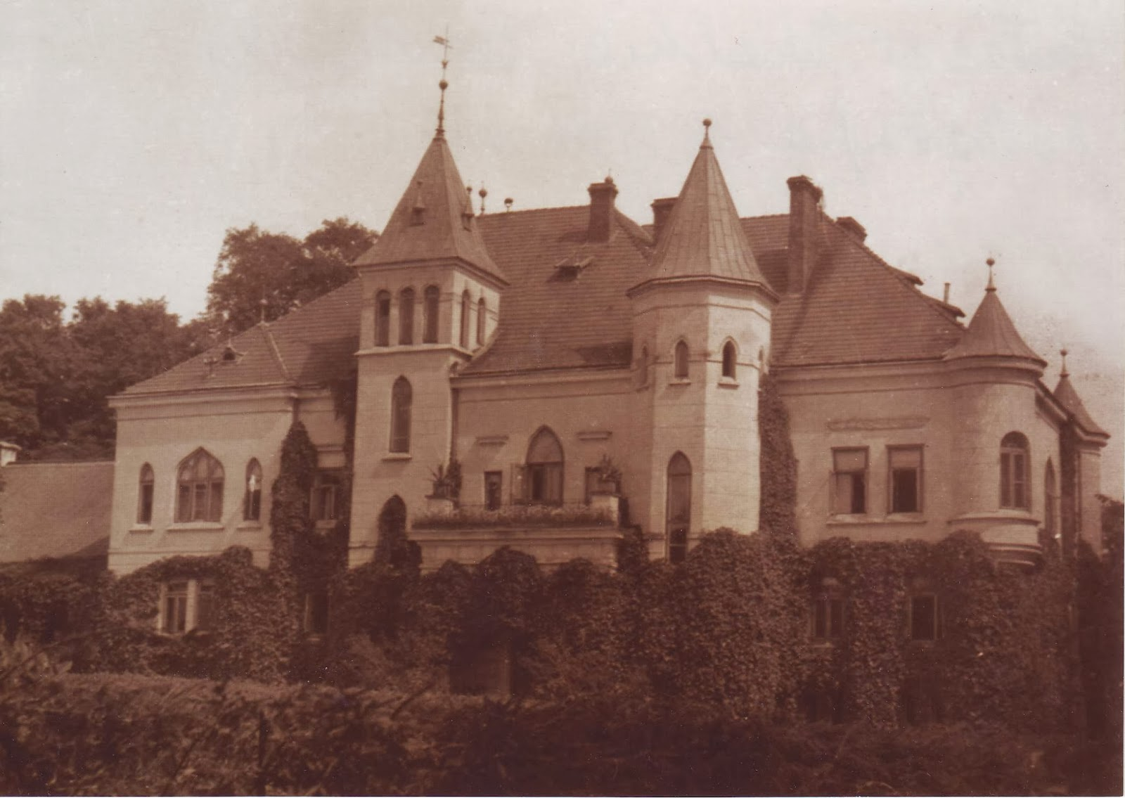 Беларуская (тарашкевіца): Бераставіца Вялікая (Bierastavica Vialikaja), сядзіба Касакоўскіх (Kasakoŭski)